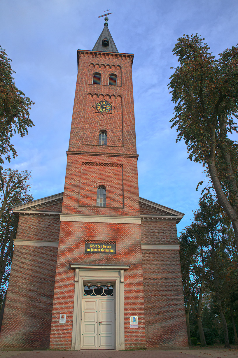 Die evangelische Kirche wurde von 1807 bis 1809 erbaut. Davor stand hier eine Kirche aus dem Jahre 1588.